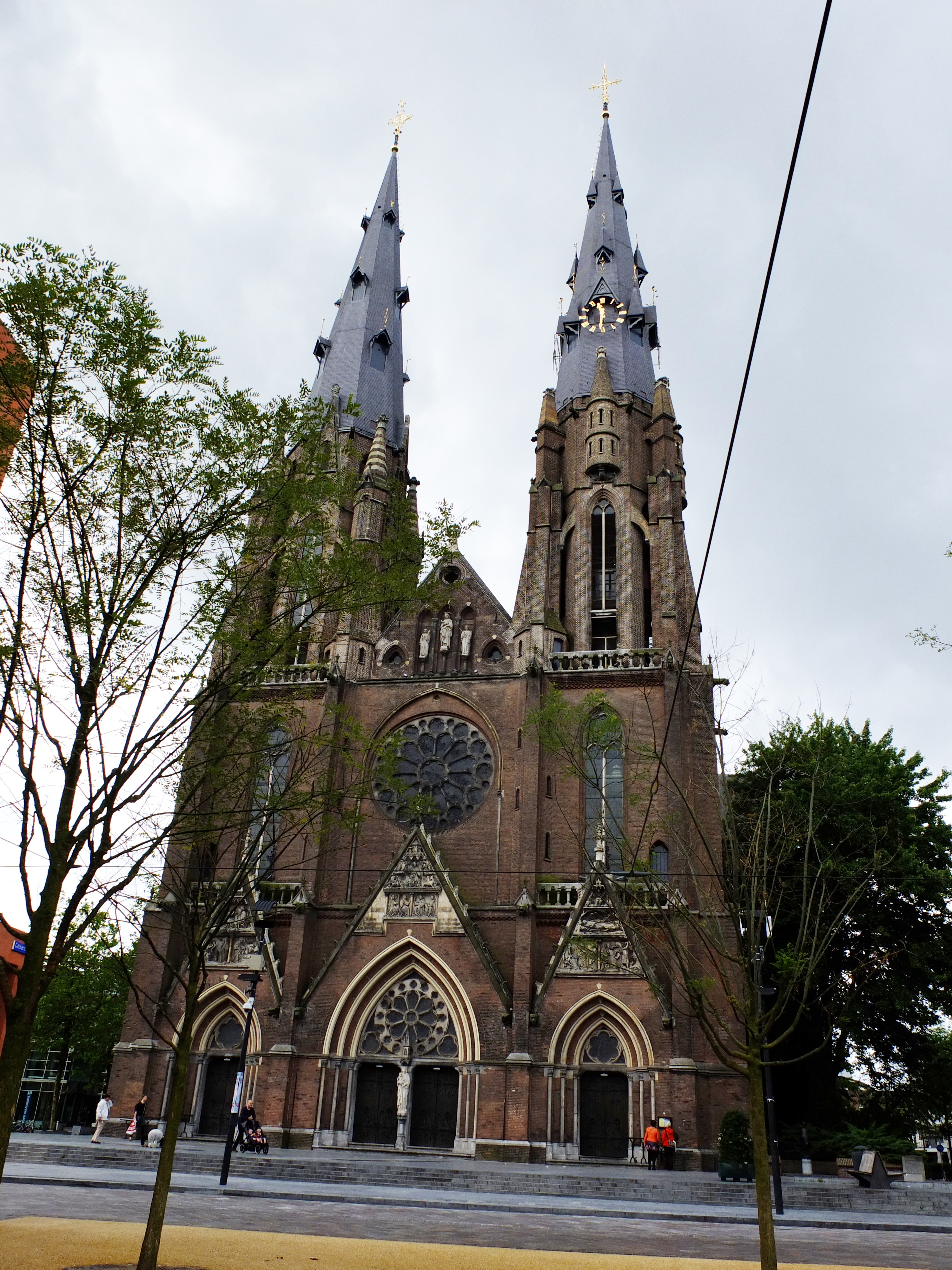 Sint-Catharinakerk